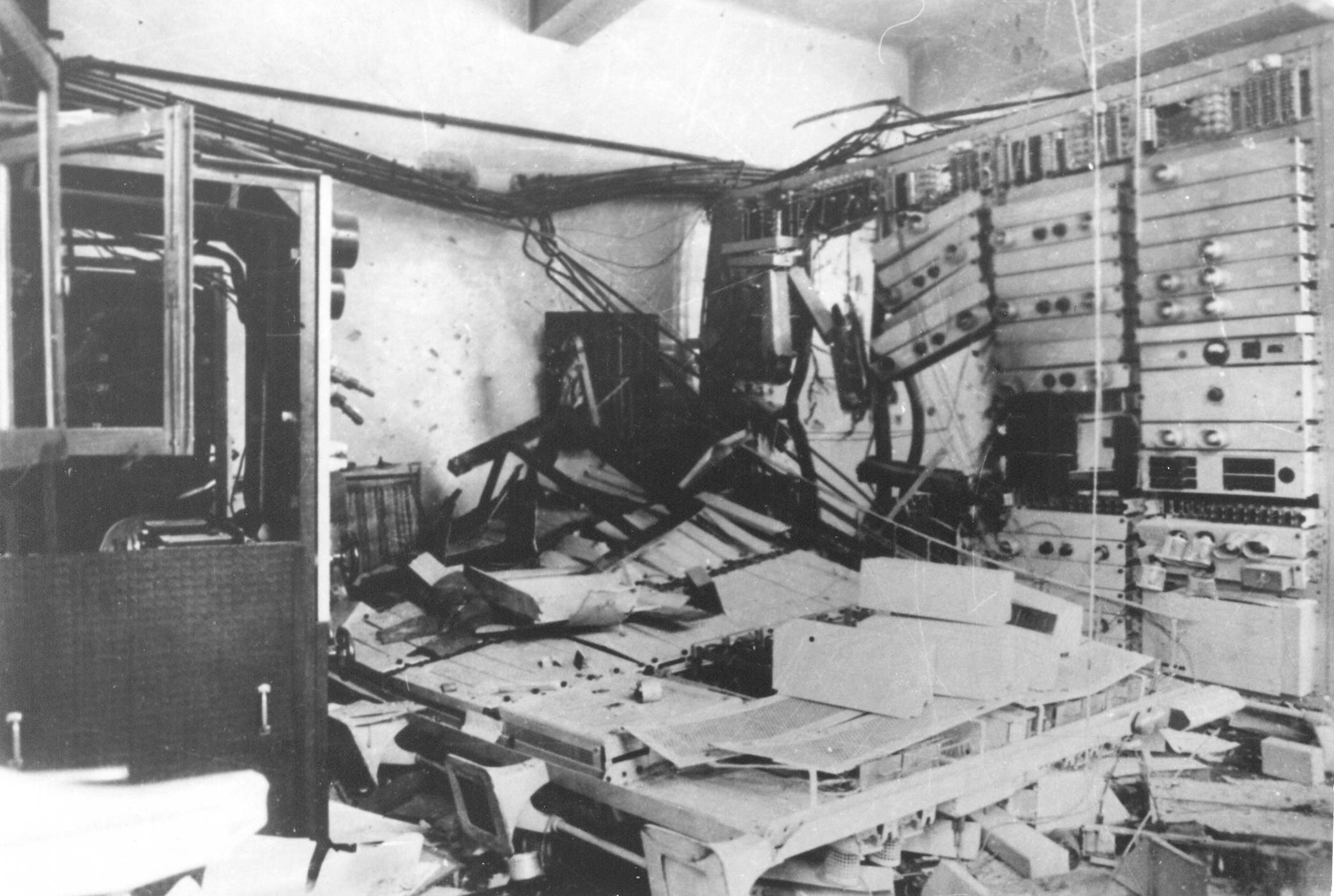 Srpskohrvatski / српскохрватски: Diverzija na Glavnoj pošti u Zagrebu 1941.